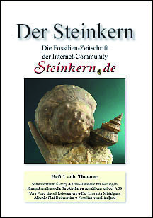 Titelblatt der erste Zeitschrift der Zeitschriftenreihe für Fossiliensammler "Der Steinkern"